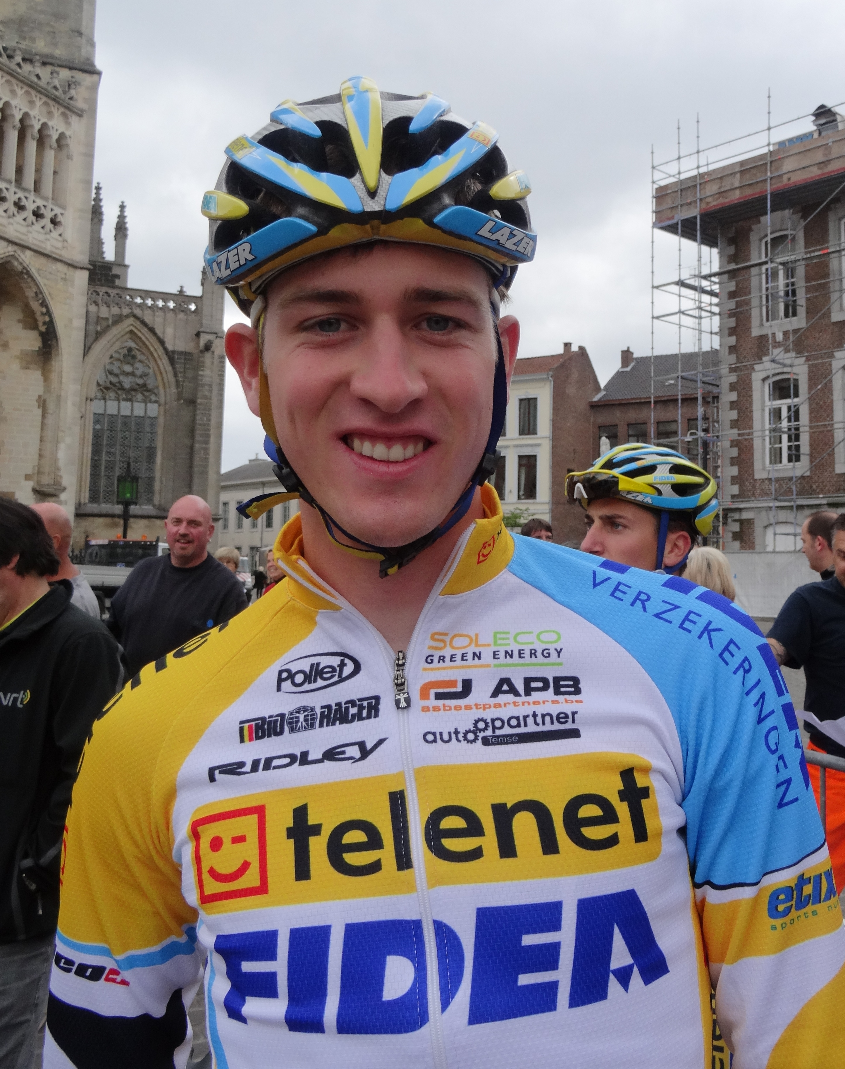 Reportage photographique réalisé le dimanche 15 juin à l'occasion du départ et de l'arrivée du Tour du Limbourg 2014 à Tongres, Belgique.